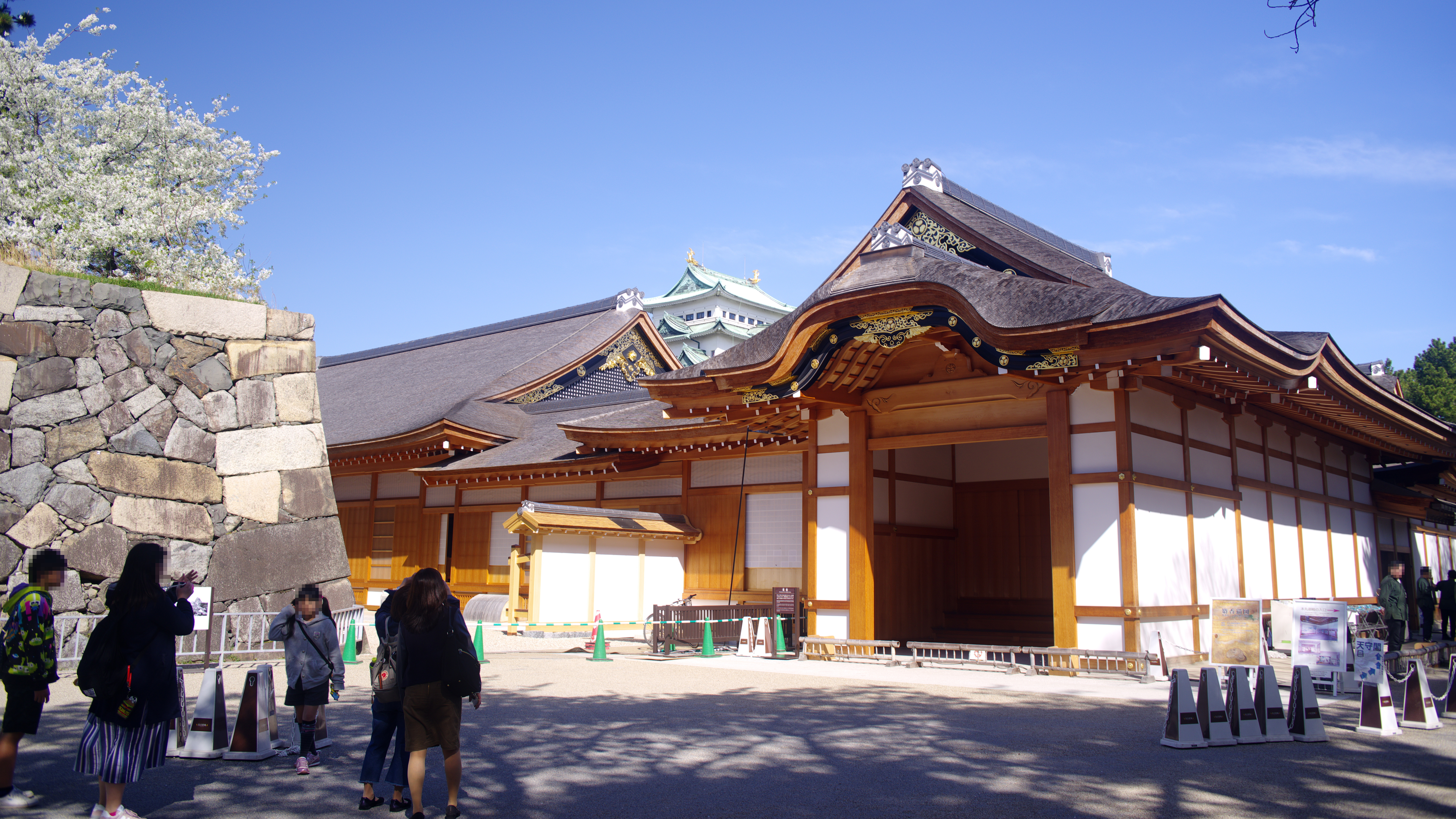 名古屋城本丸御殿外観。背後に大天守。